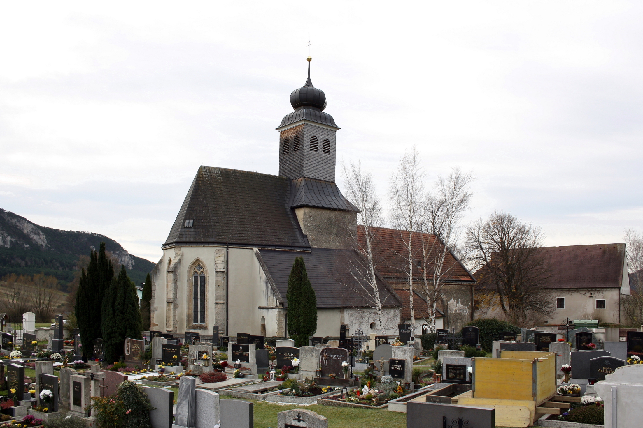 Die Pfarrkirche "St. Peter im Moos" von Muthmannsdorf in der niederösterreichischen Gemeinde Winzendorf-Muthmannsdorf